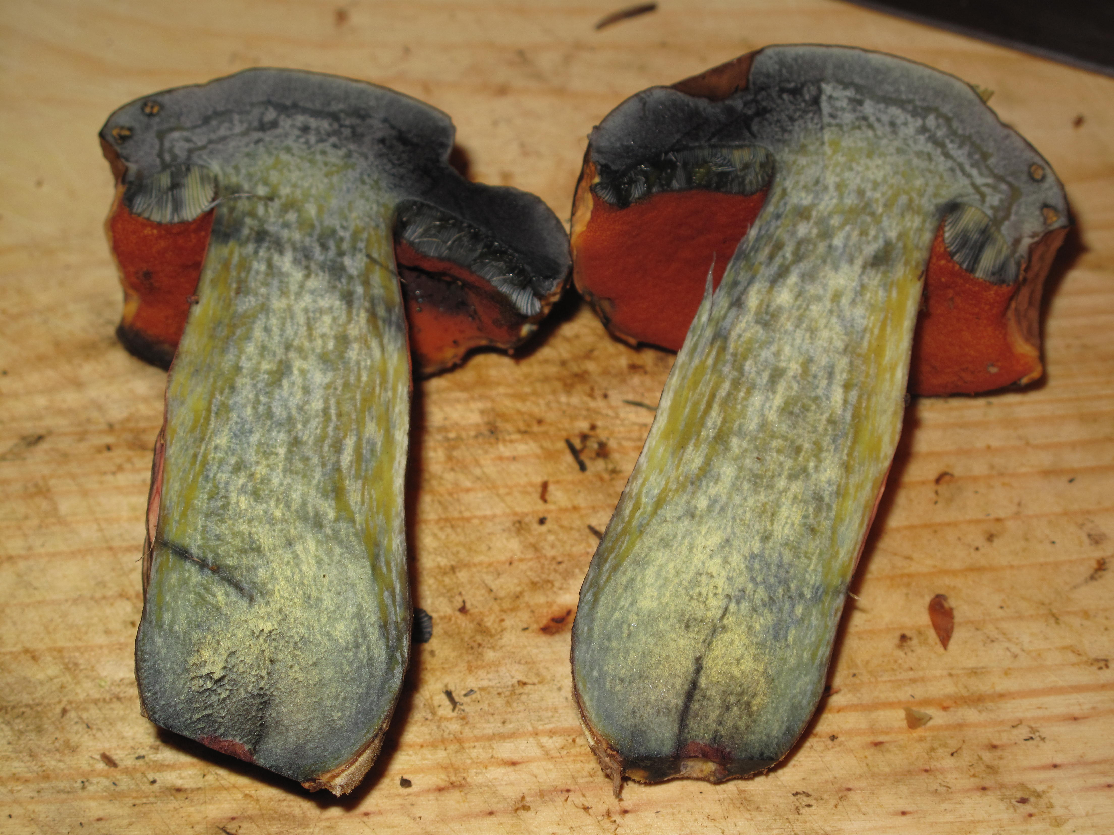 Hřib kovář, cca 2 minuty po rozříznutí